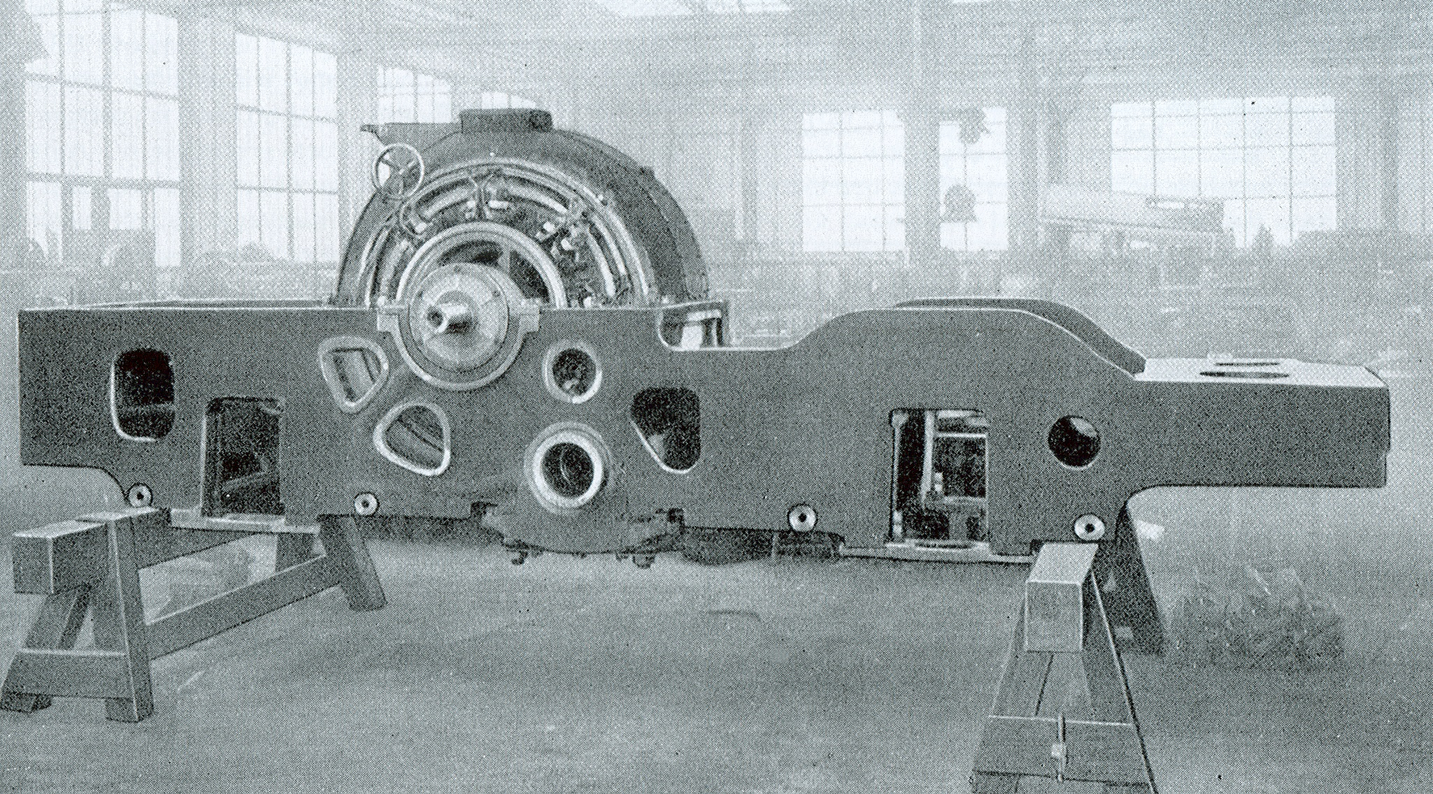 Foto des Drehgestellrahmens der EP 215 auf einem Werkfoto der AEG